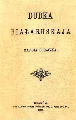 Беларуская (тарашкевіца): Вокладка кнігі «Дудка беларуская» Францішка Багушэвіча. 1891 рок